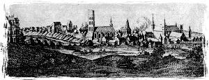 Panorama Lidzbarka Warmińskiego